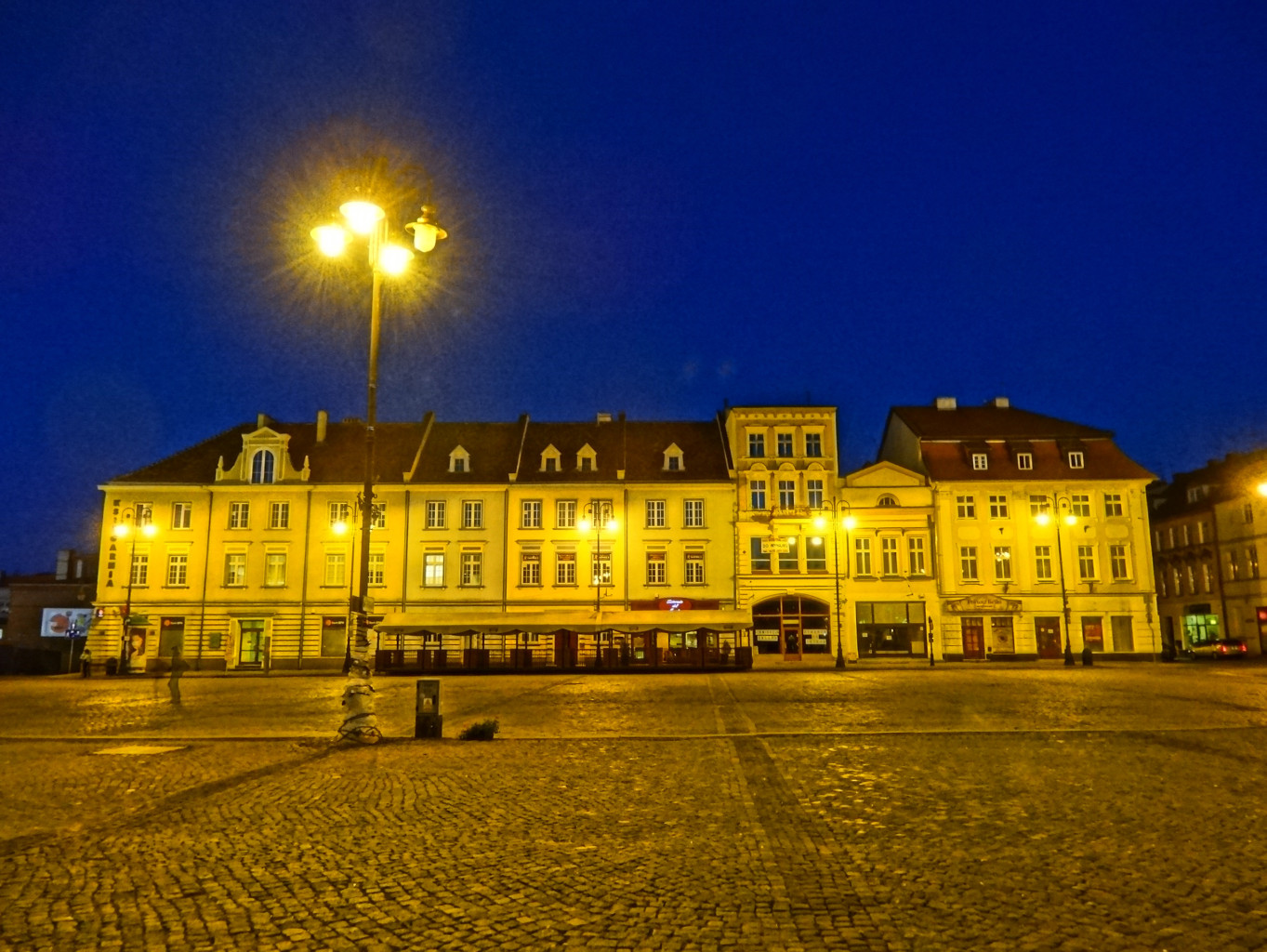 Stary Rynek w Bydgoszczy